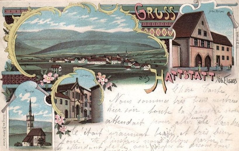 Ansichtskarte von Hattstatt im Elsass